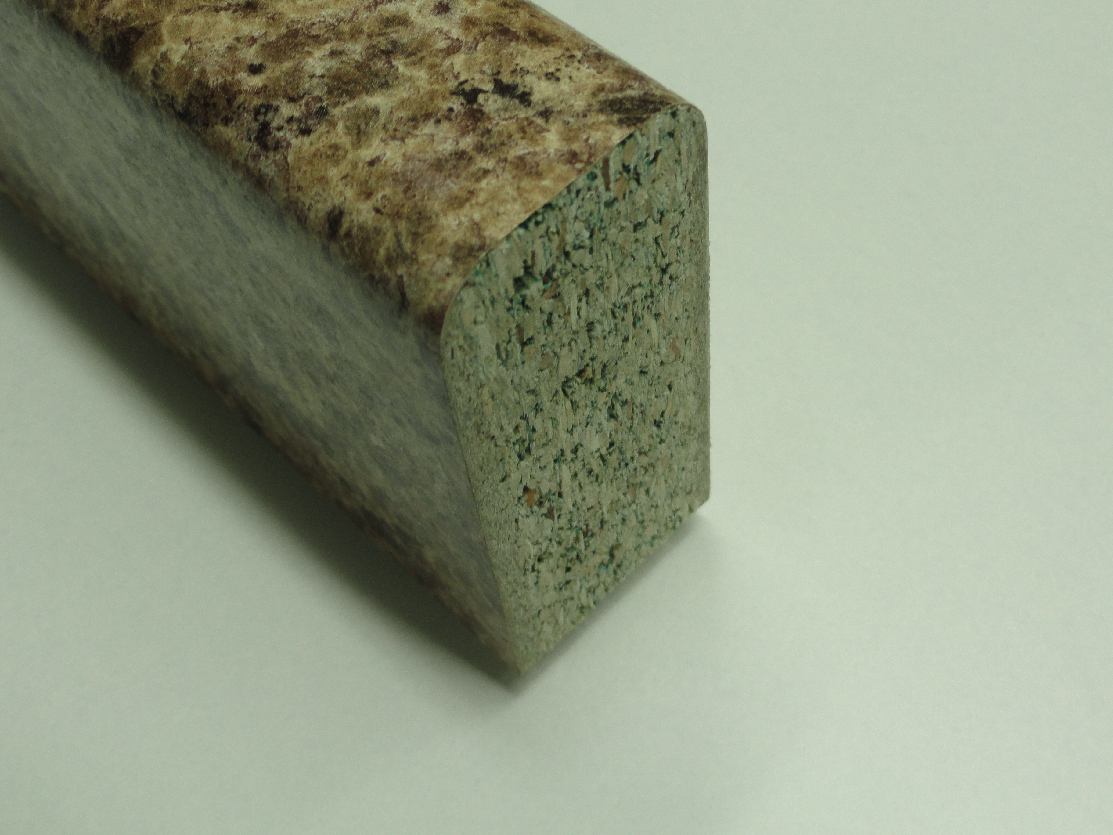 Декоративный бумажно-слоистый пластик ДБСП Decorative HPLaminate